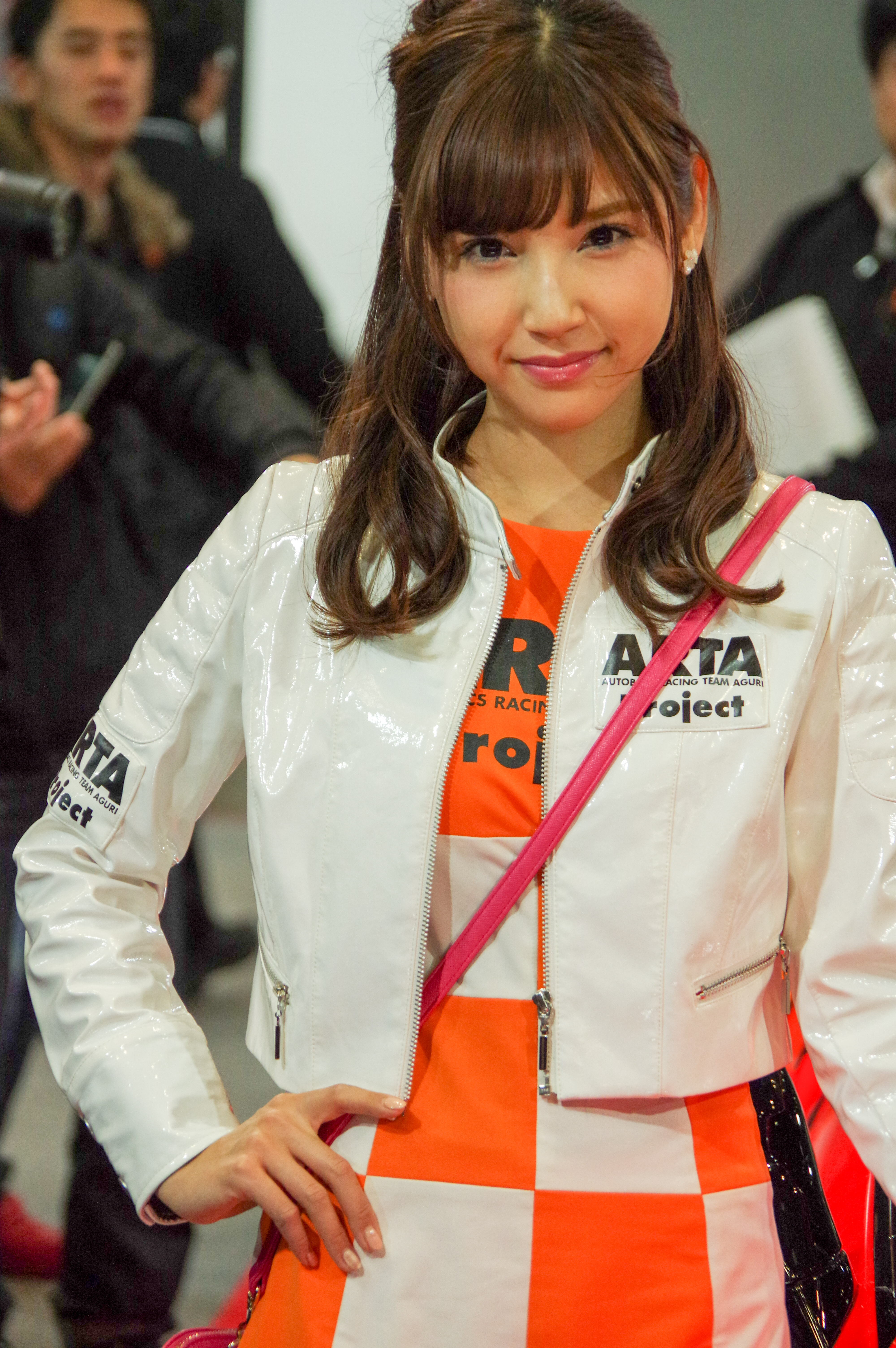 TOKYO AUTO SALON 2016 _34